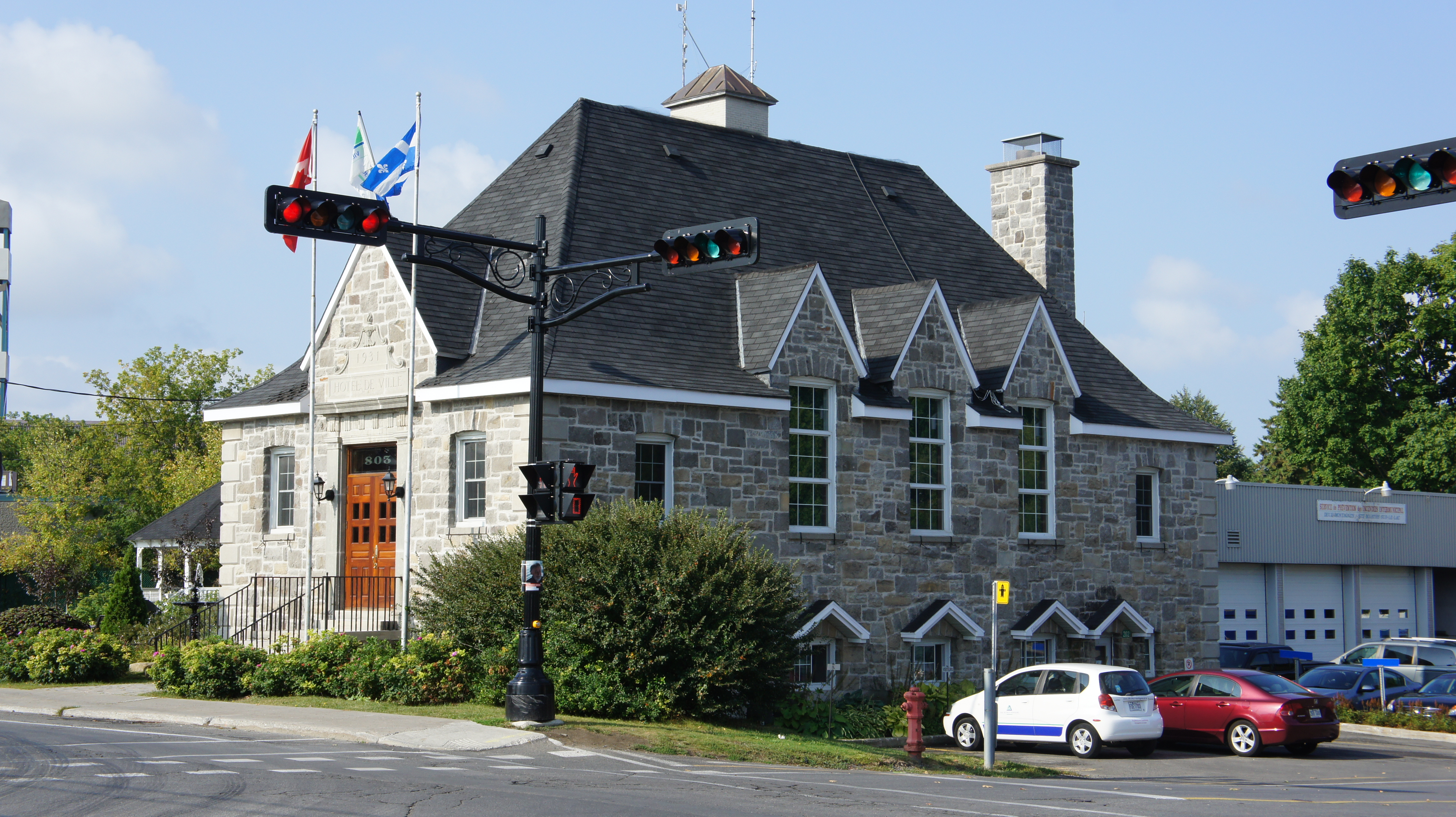 Site du patrimoine de l'hôtel de ville